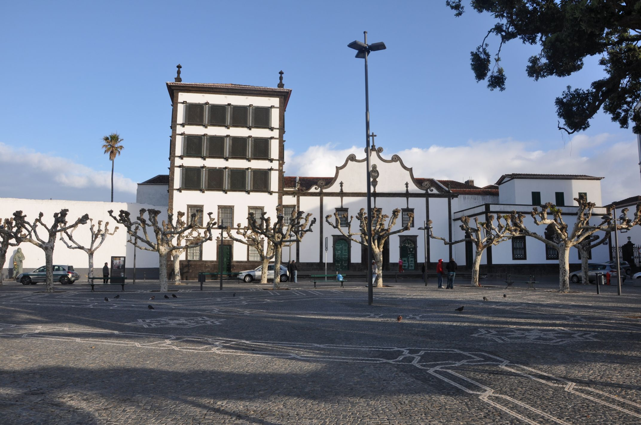 Santuário do Senhor Santo Cristo dos Milagres, Ponta Delgada, Açores